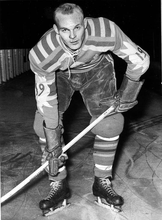 Roland Stolz